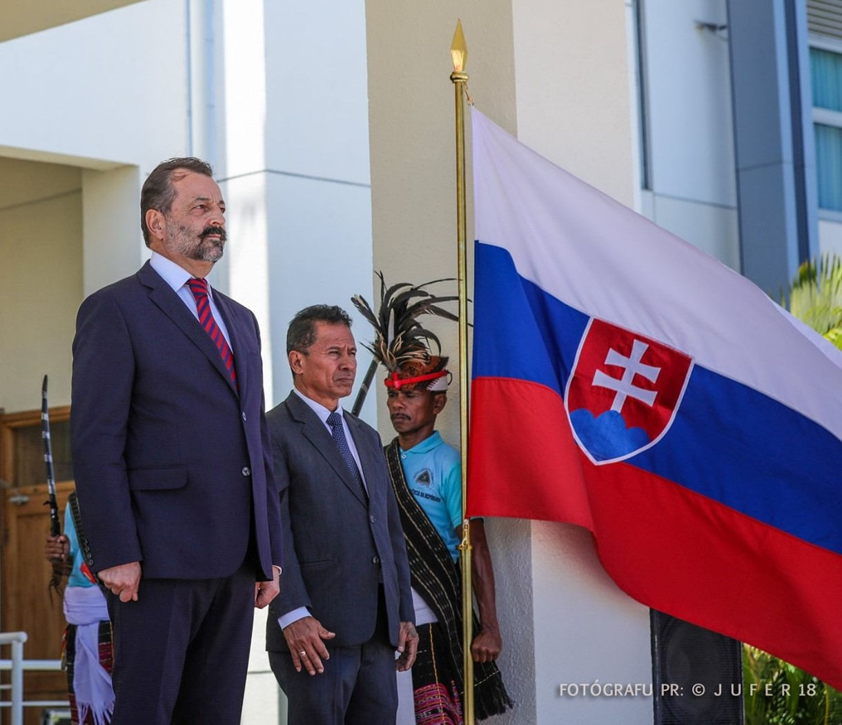 Jaroslav Chlebo übergibt seine Akkreditierung als Botschafter der Slowakei an Osttimors Staatspräsident Francisco Guterres.